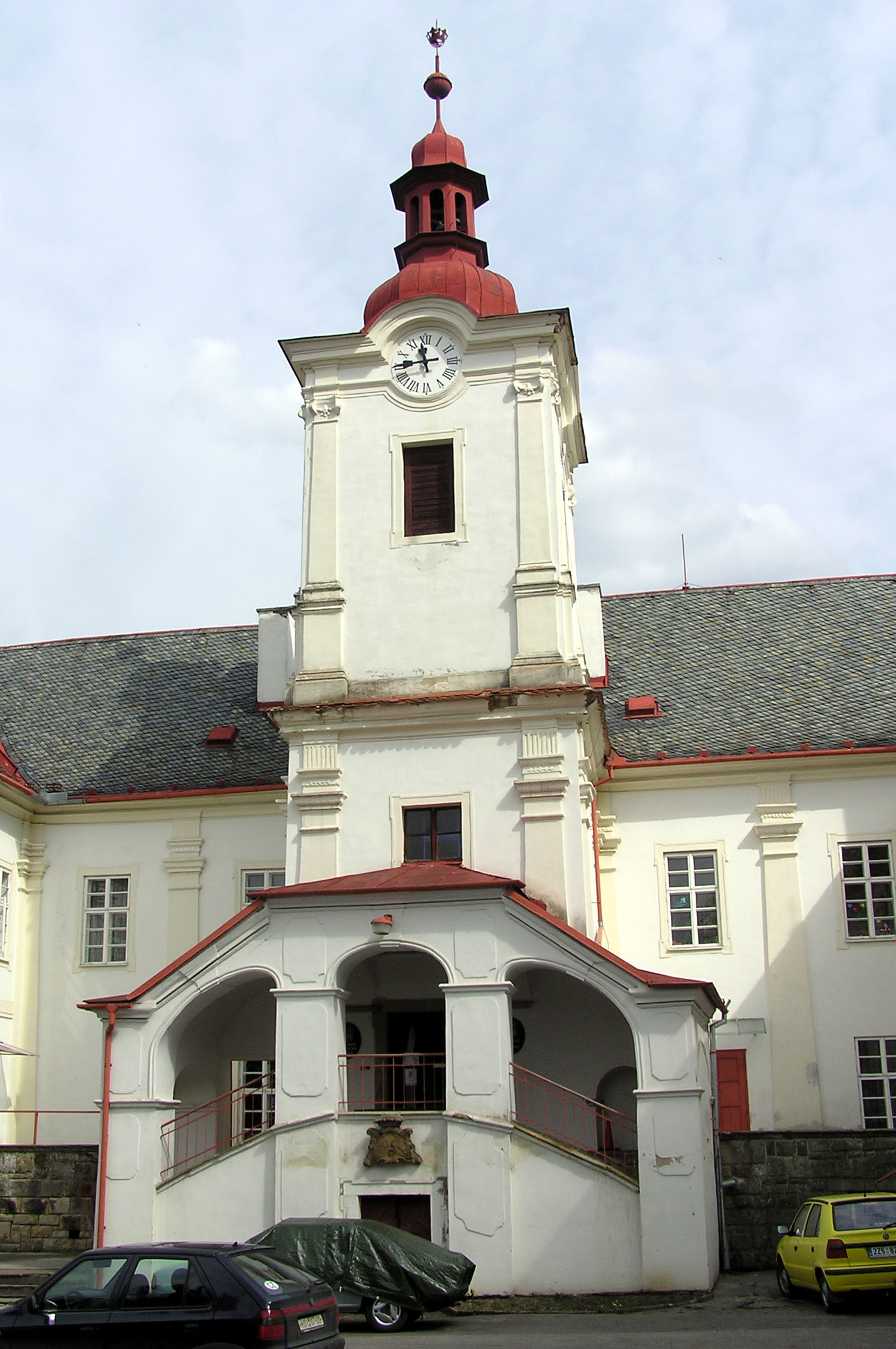 Luhačovice - zámek Serenyiů